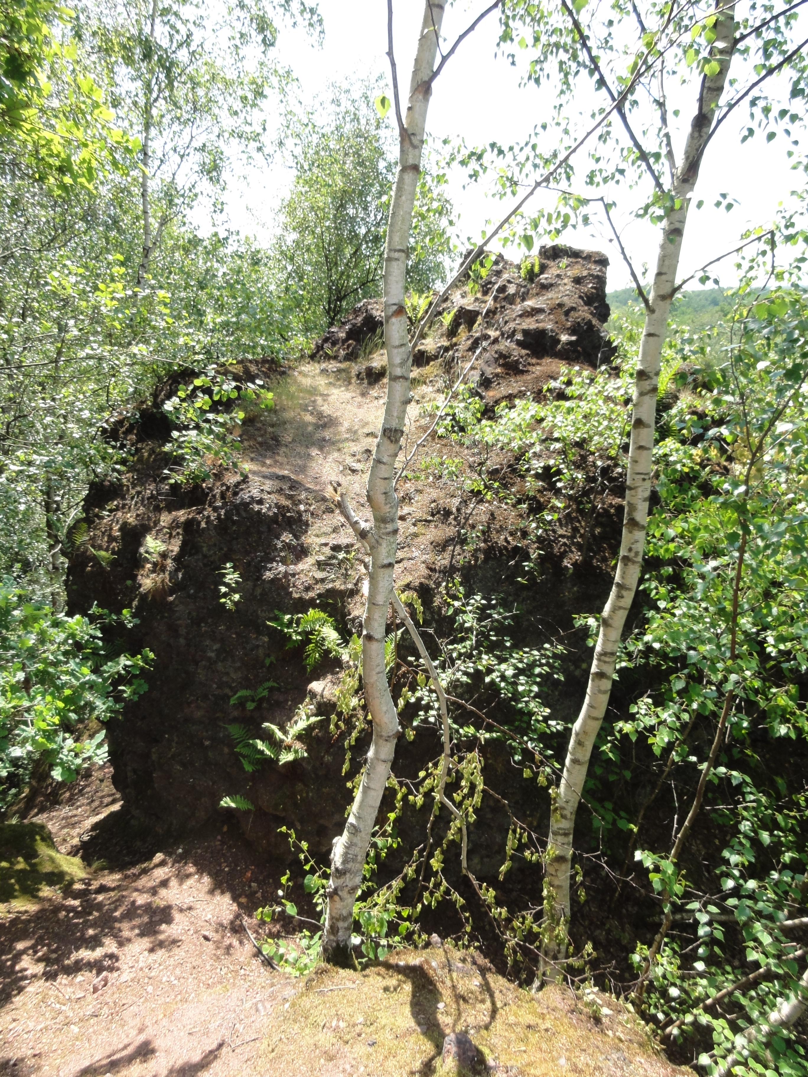 Terril n° 173 dit Vicoigne Est, Fosse n° 4 de la Compagnie des mines de Vicoigne, Raismes, Nord, Nord-Pas-de-Calais, France.